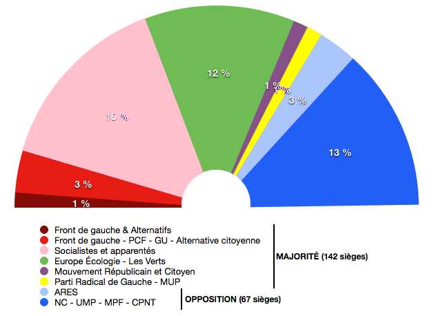 Structure